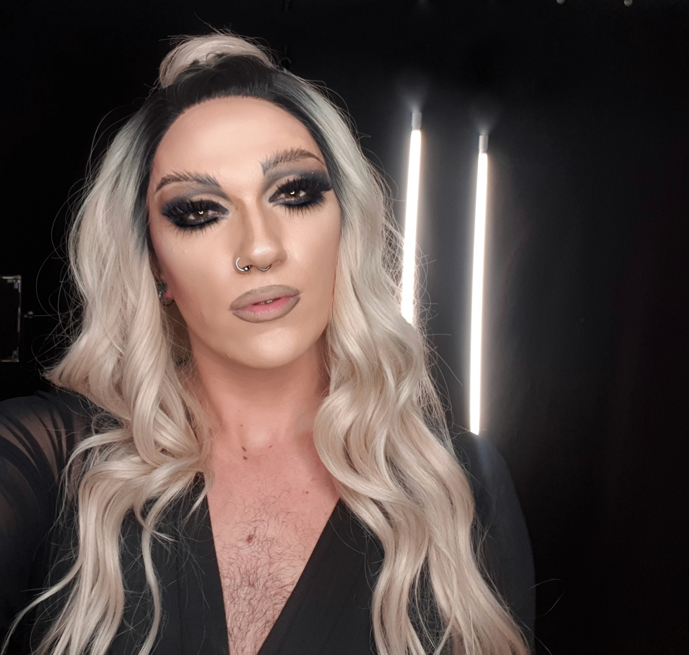 Marcel Kaupp alias Marcella Rockefeller, 2020